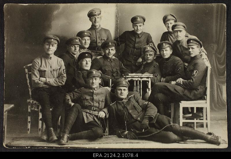 Eesti Vabadussõda. Kuperjanovi partisanide pataljoni ohvitserid 1. juulil 1919 Võrus.